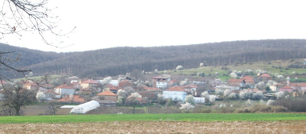 Черна могила април 2009